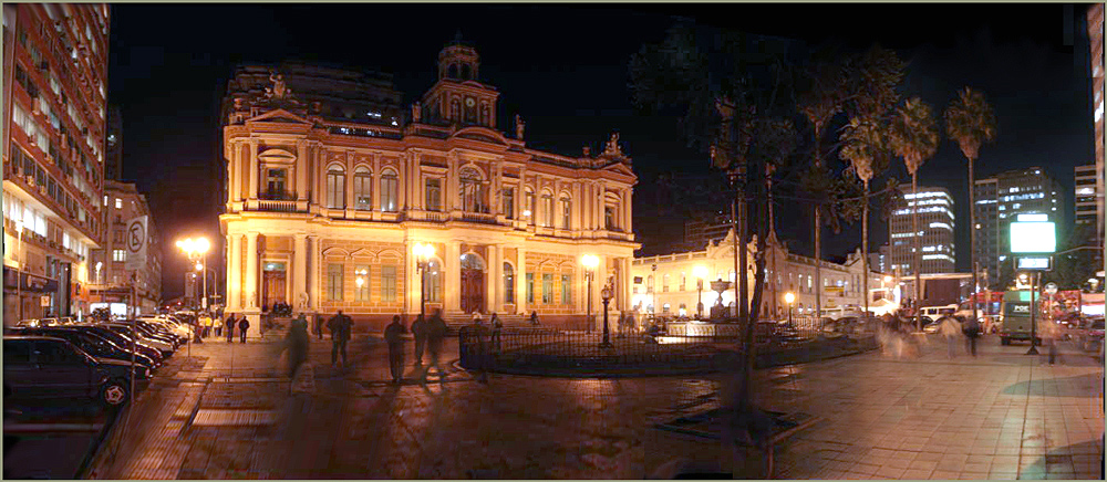 centro de Porto Alegre à noite, vendo-se a Prefeitura Velha (Paço Municipal) e à direita o Mercado Público. Porto Alegre, Rio Grande do Sul, Brasil.